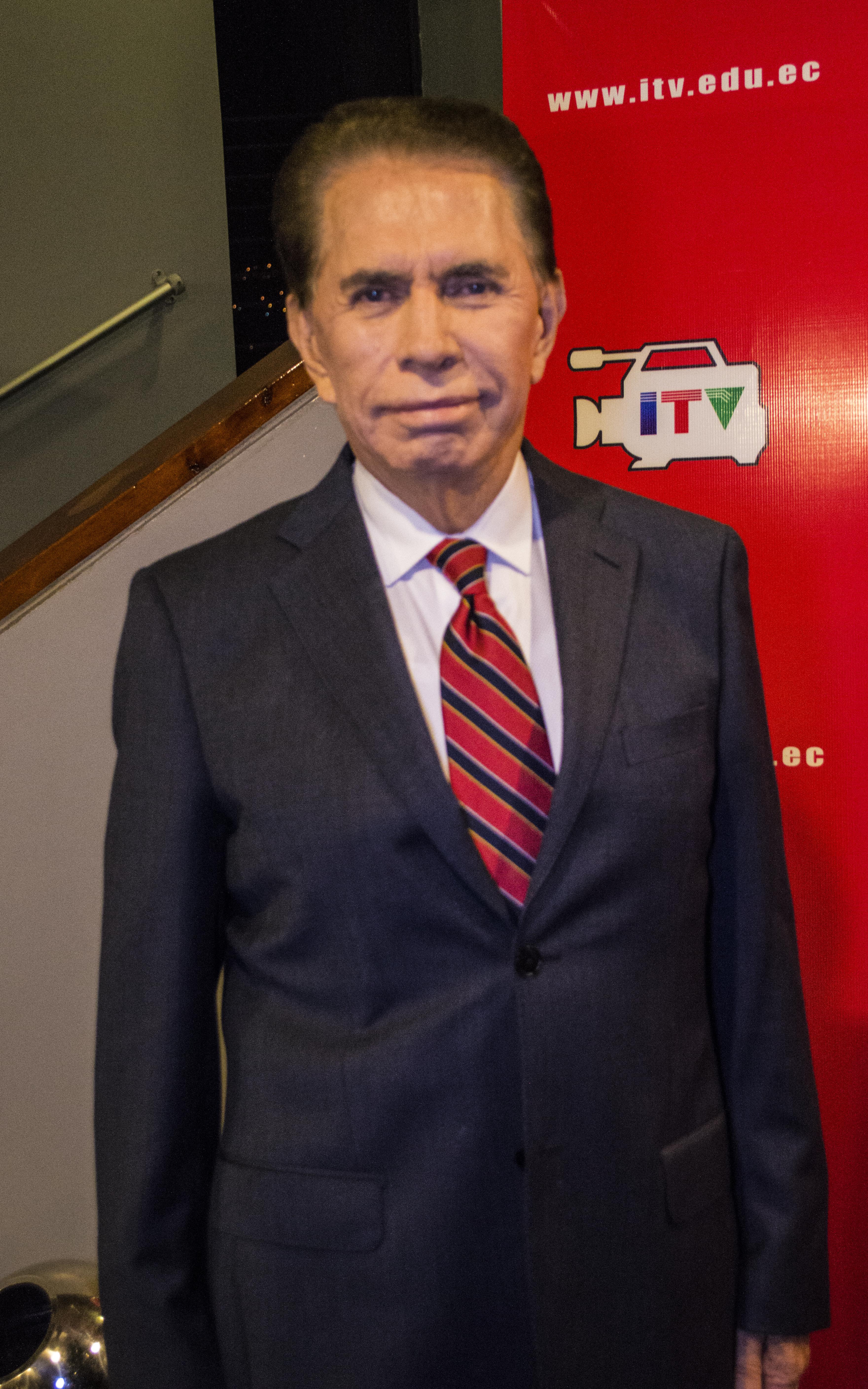 Alfonso Espinosa de los Monteros en 2016 en los Premios ITV